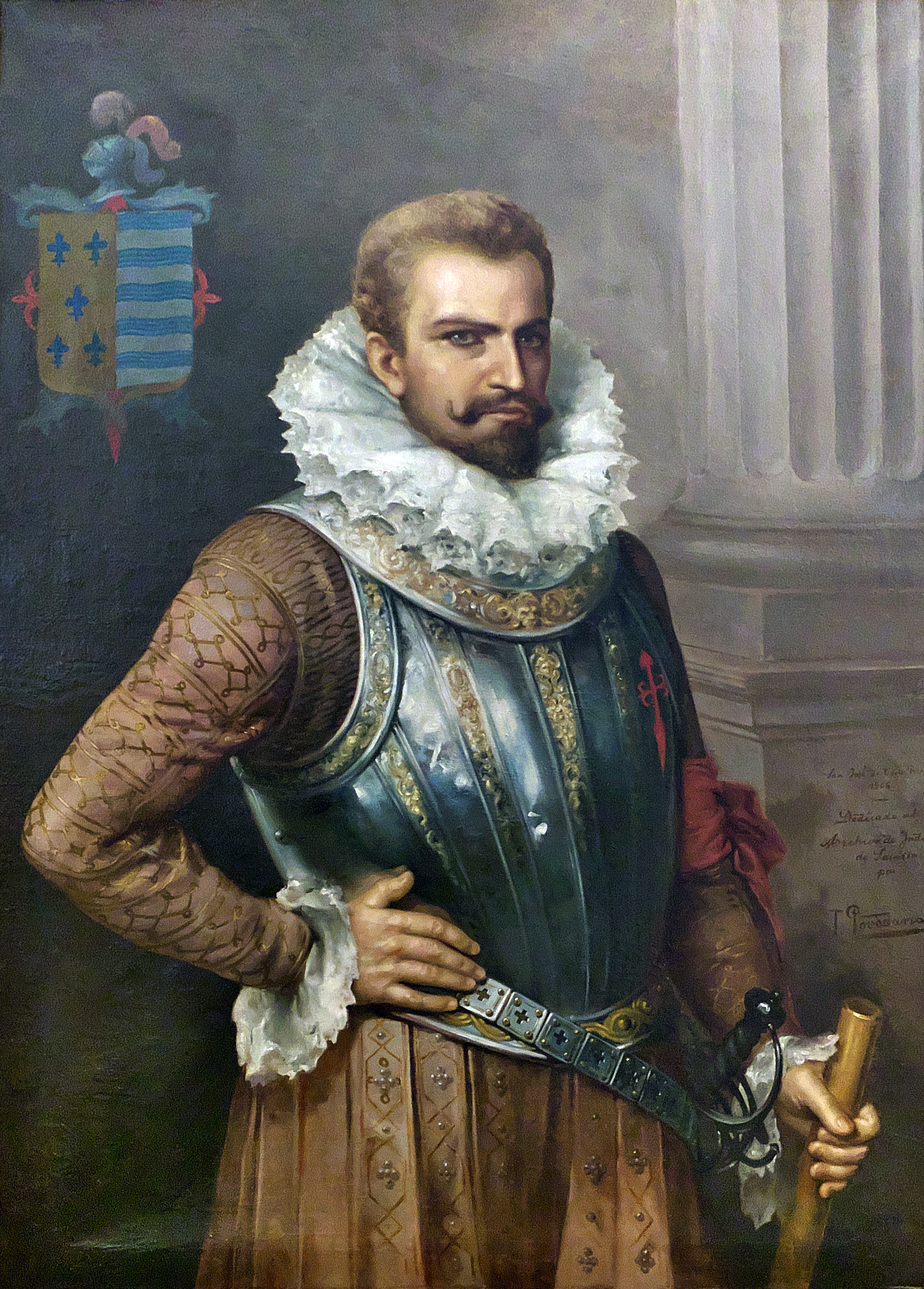 Archivo General de Indias. Tomás Povedano (1906) pinta a Pedro de Alvarado (†1541), gobernador de Guatemala. Óleo sobre lienzo.